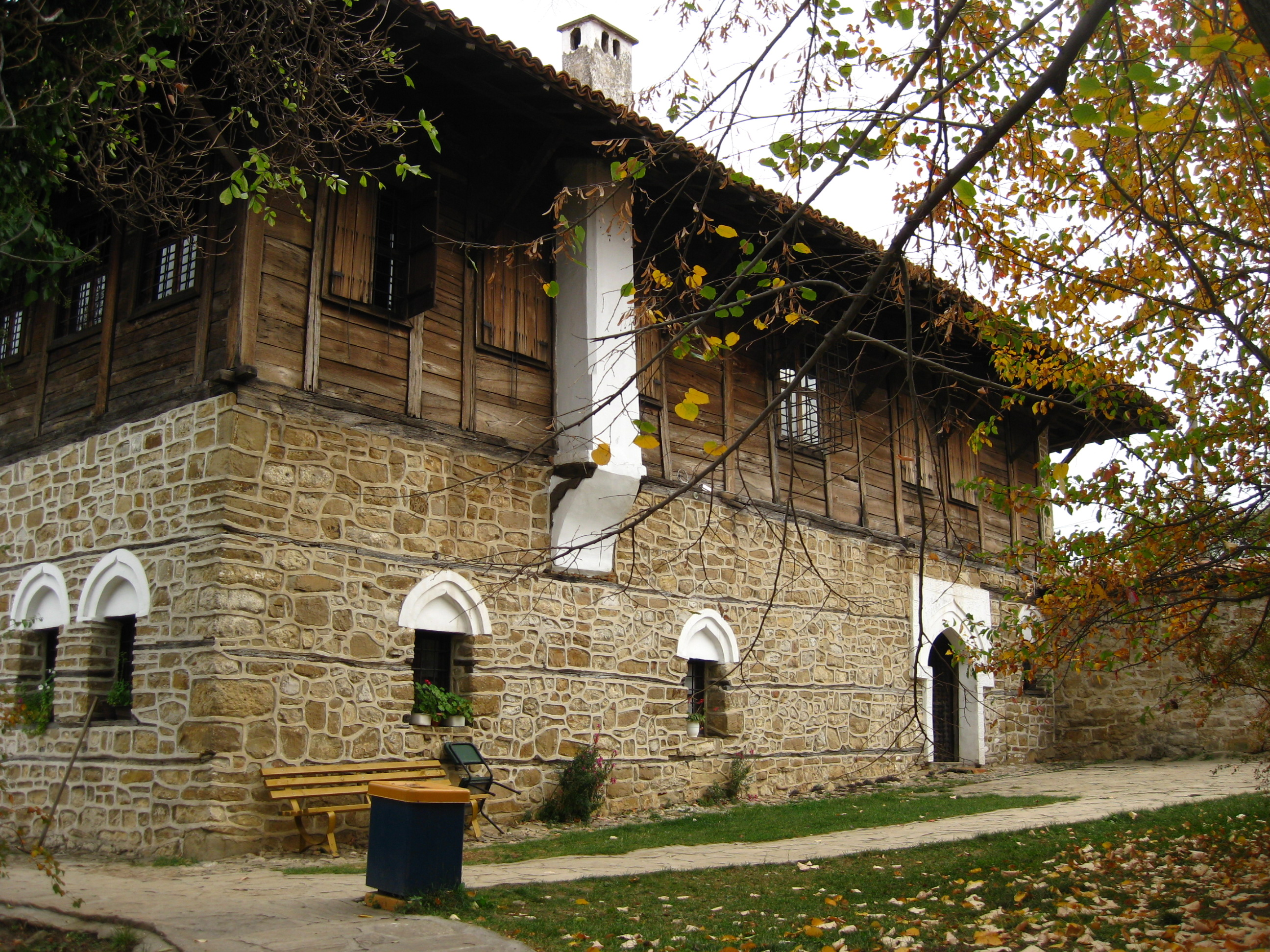 House in Arbanasi, Bulgaria